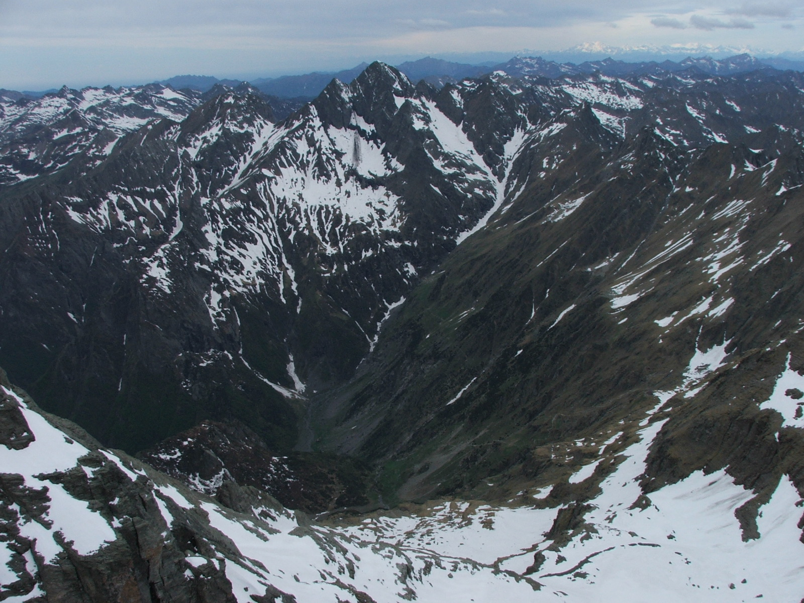 Pizzo Diavolo di Tenda, Orobie.